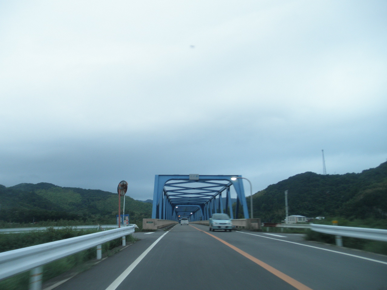 徳島県阿南市上大野町萱原 持井橋